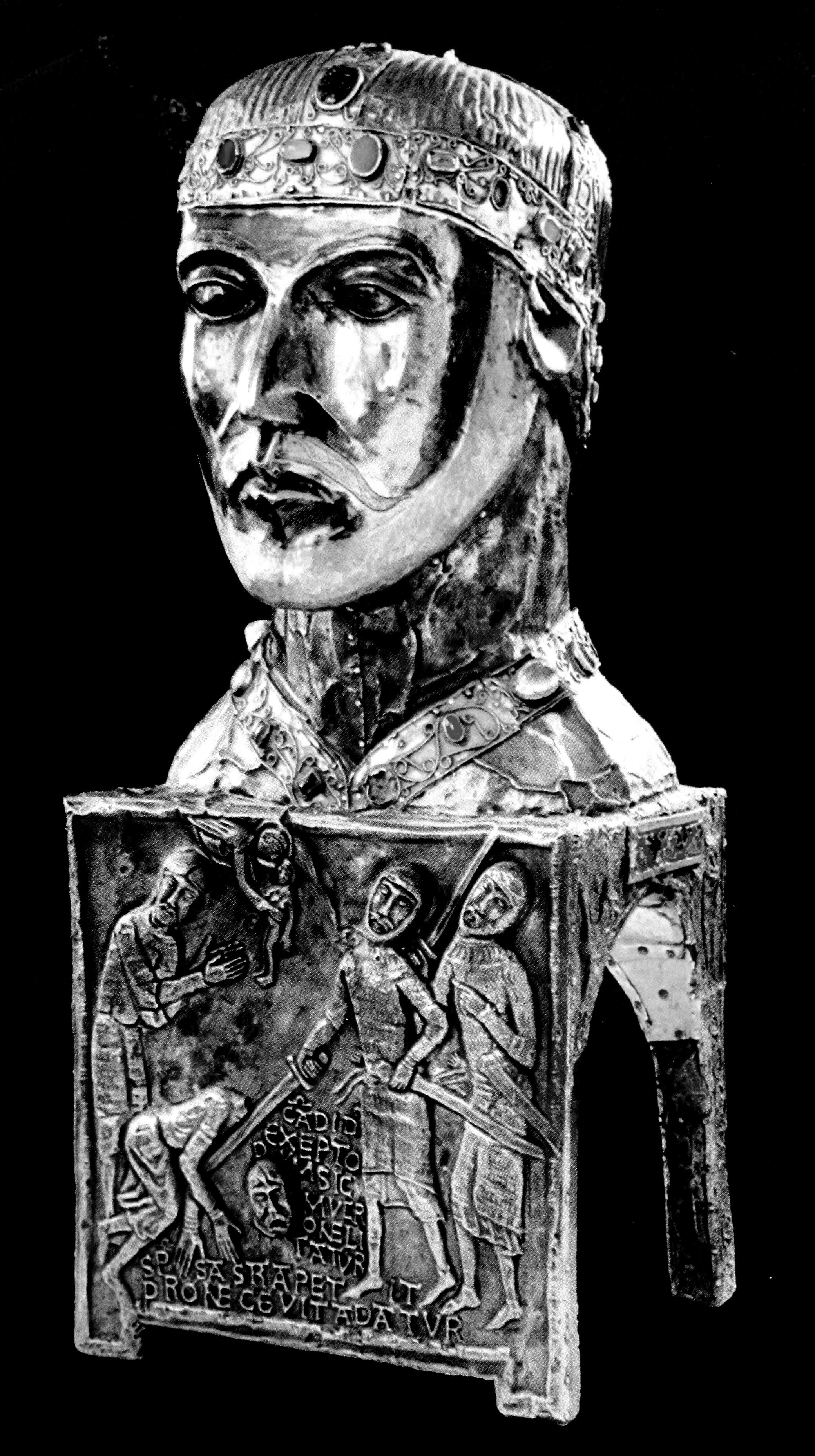 Suisse, canton du Valais, Saint-Maurice, Abbaye, trésor, reliquaire de Saint-Candide.